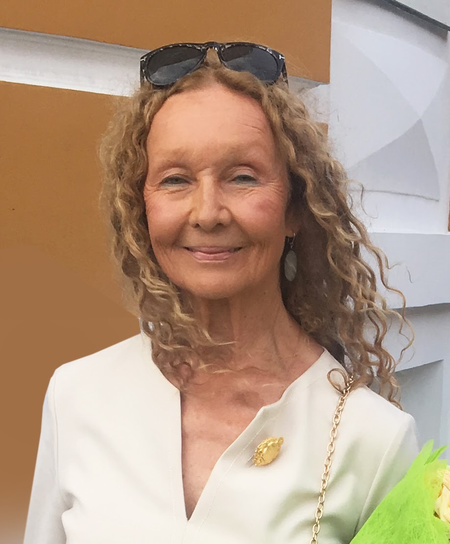 Головина Светлана Васильевна, актриса театра и кино, художник